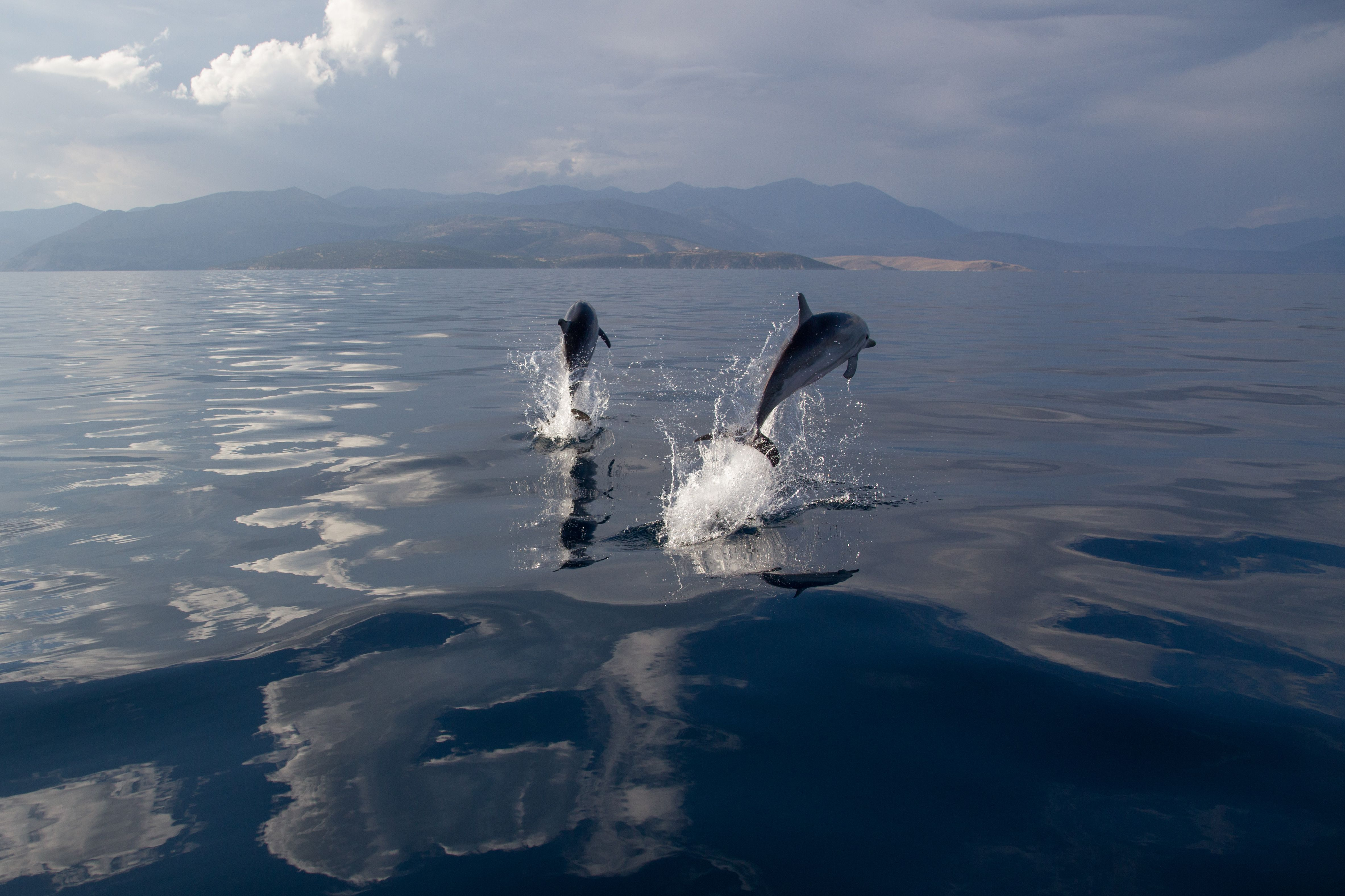 Striped dolphins in the Gulf of Corinth, Greece